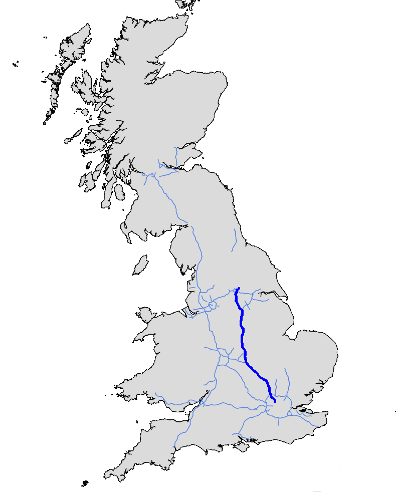 M1